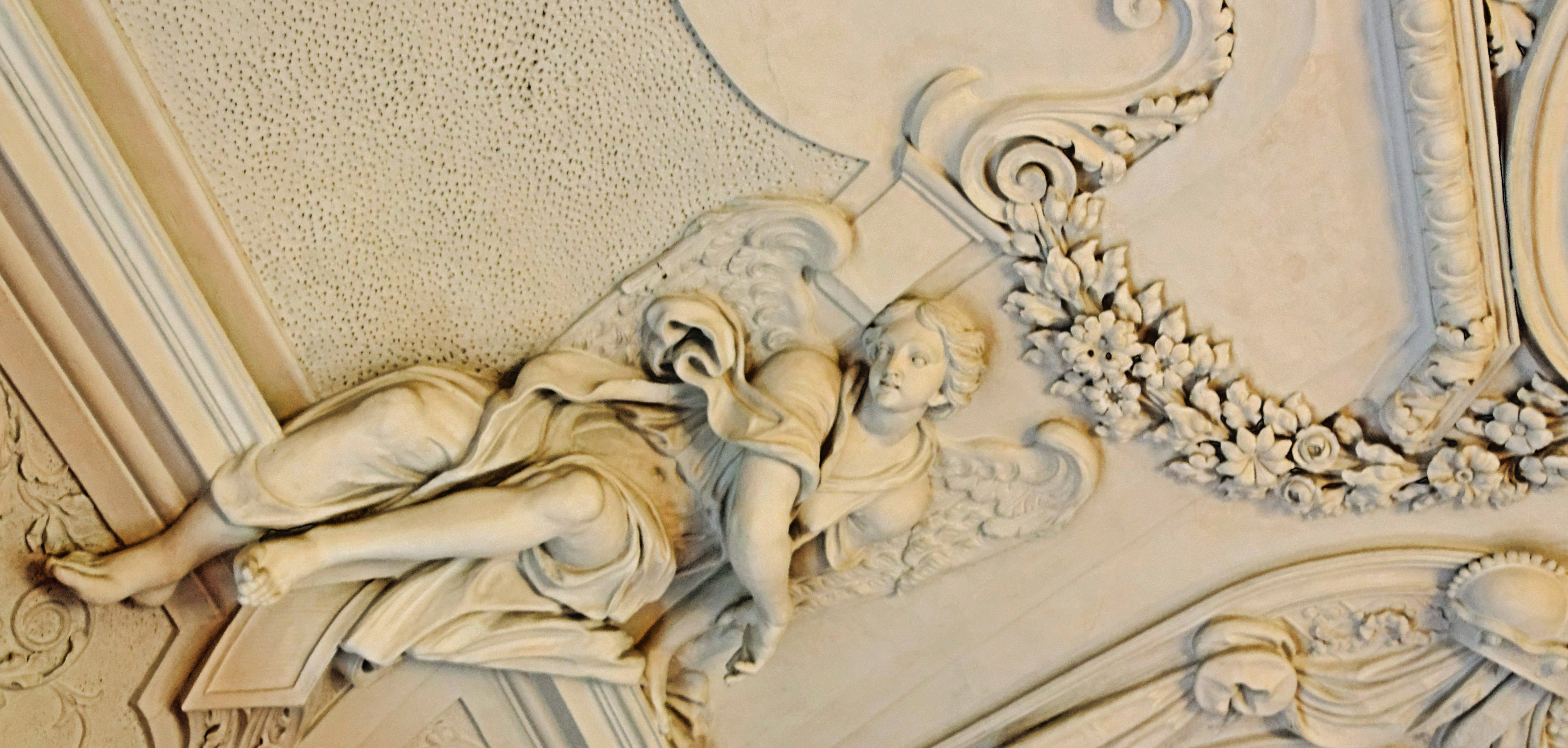 Thüringer Staatskanzlei - Innen; Stuck von Gottfried Gröninger, 1718–1722, nach Vorlagen von Johann Peter Castelli